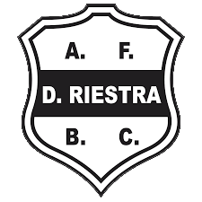 Escudo de Deportivo Riestra